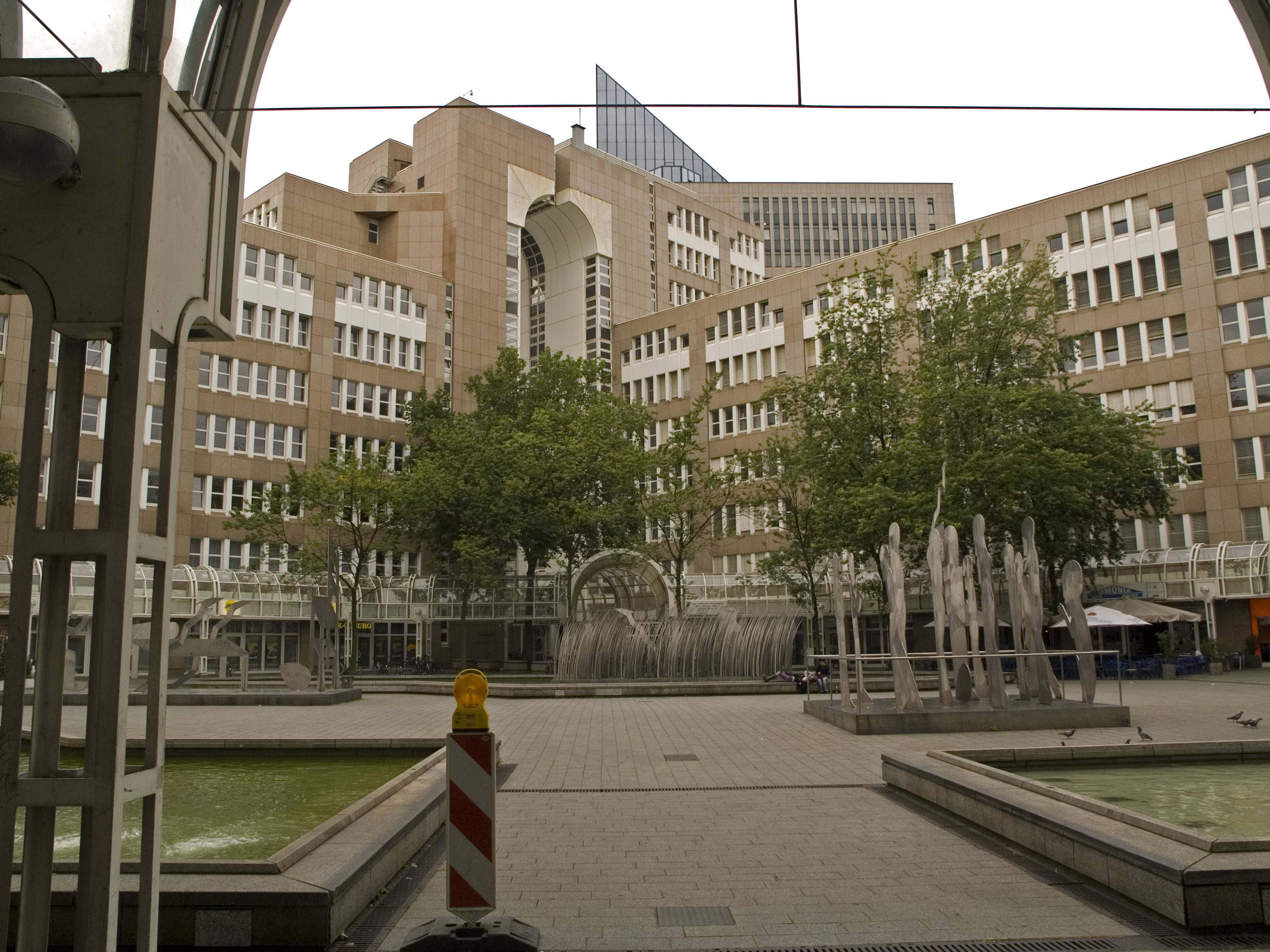 Северный Рейн - Вестфалия, Дюссельдорф - площадь Bertha-von-Suttner-Platz